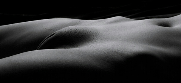 Mons pubis hd black and white